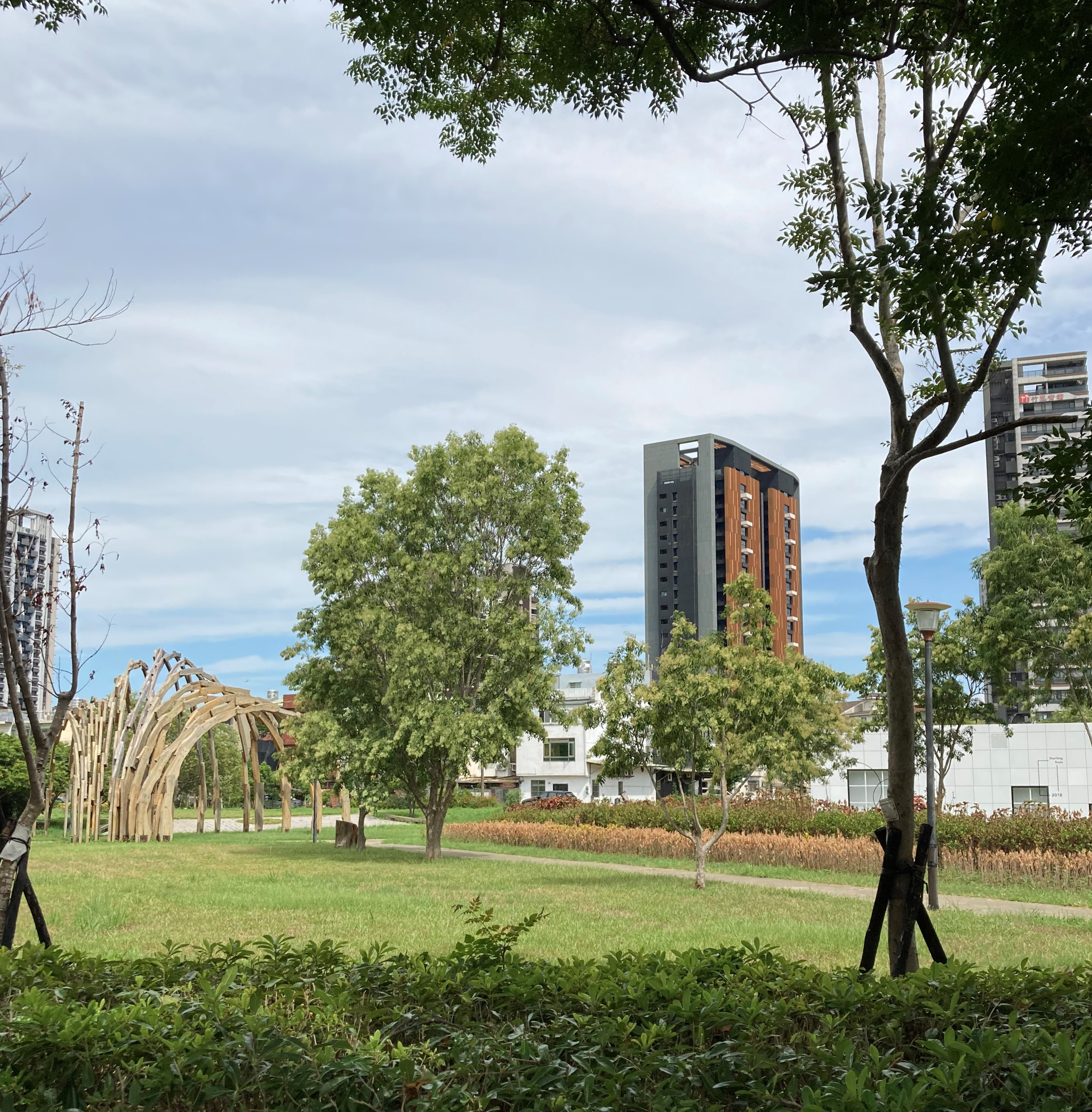 中文（台灣）: 中壢青埔街景